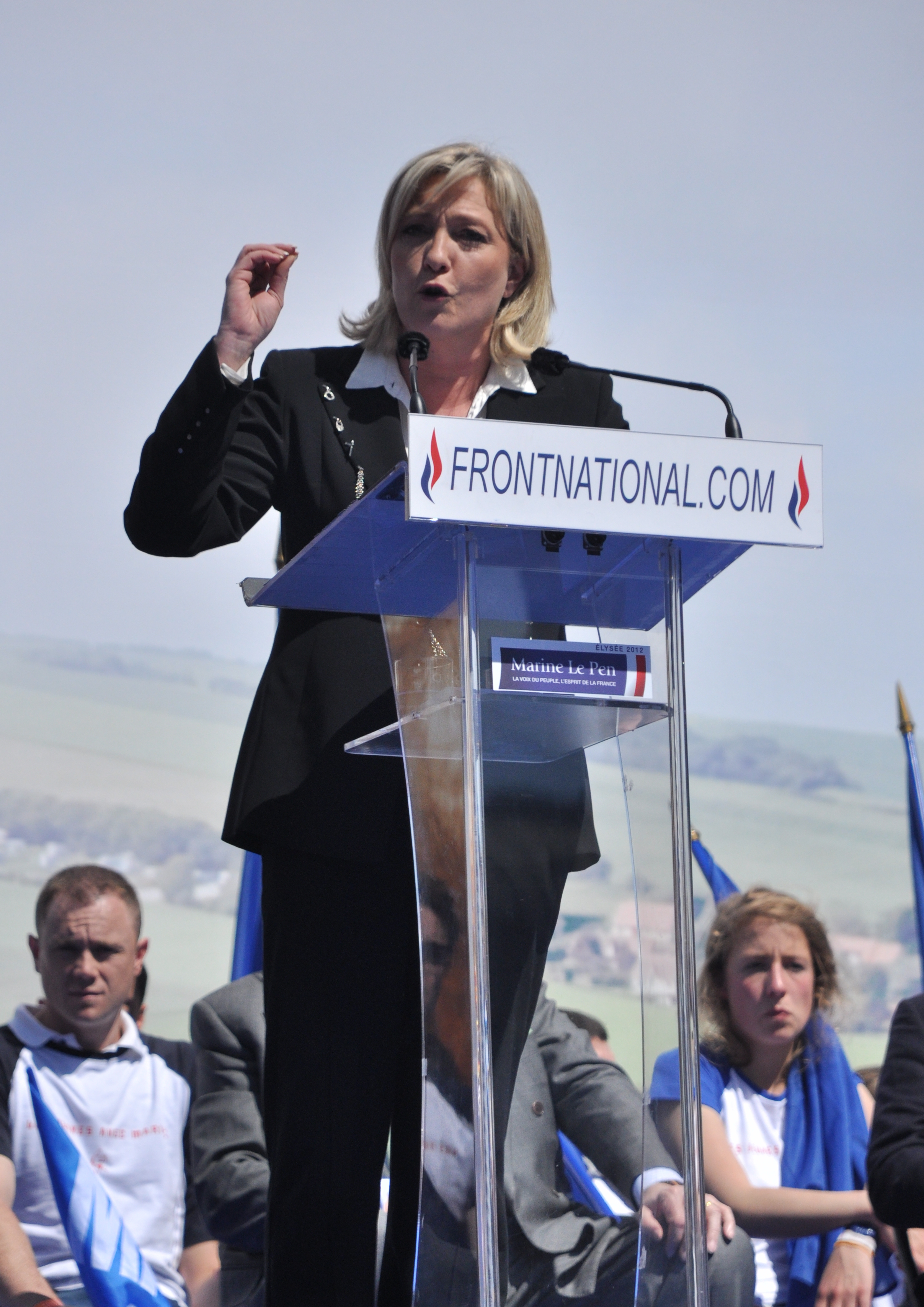 Le 1er mai 2012, comme chaque année, les militants du Front National ont défilé dans Paris et se sont retrouvés devant l'Opéra Garnier pour un meeting. Jean-Marie Le Pen et Marine Le Pen y ont prononcé chacun un discours, en pleine campagne de l'entre-deux tours de la présidentielle. Parmi les attentes, une consigne de vote de la part de la présidente du FN, qui n'en a pas donnée et a annoncé voter blanc à titre personnel.